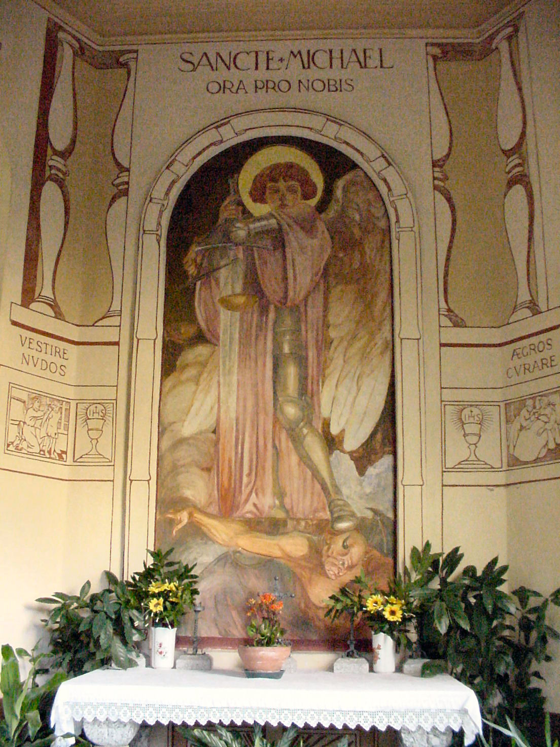 interno cappella Lazzaretto di Canzo (Co)